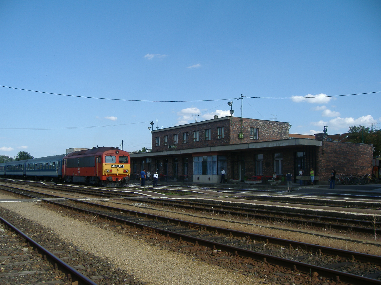 A gyulai vasútállomás 2007.07.15-én.